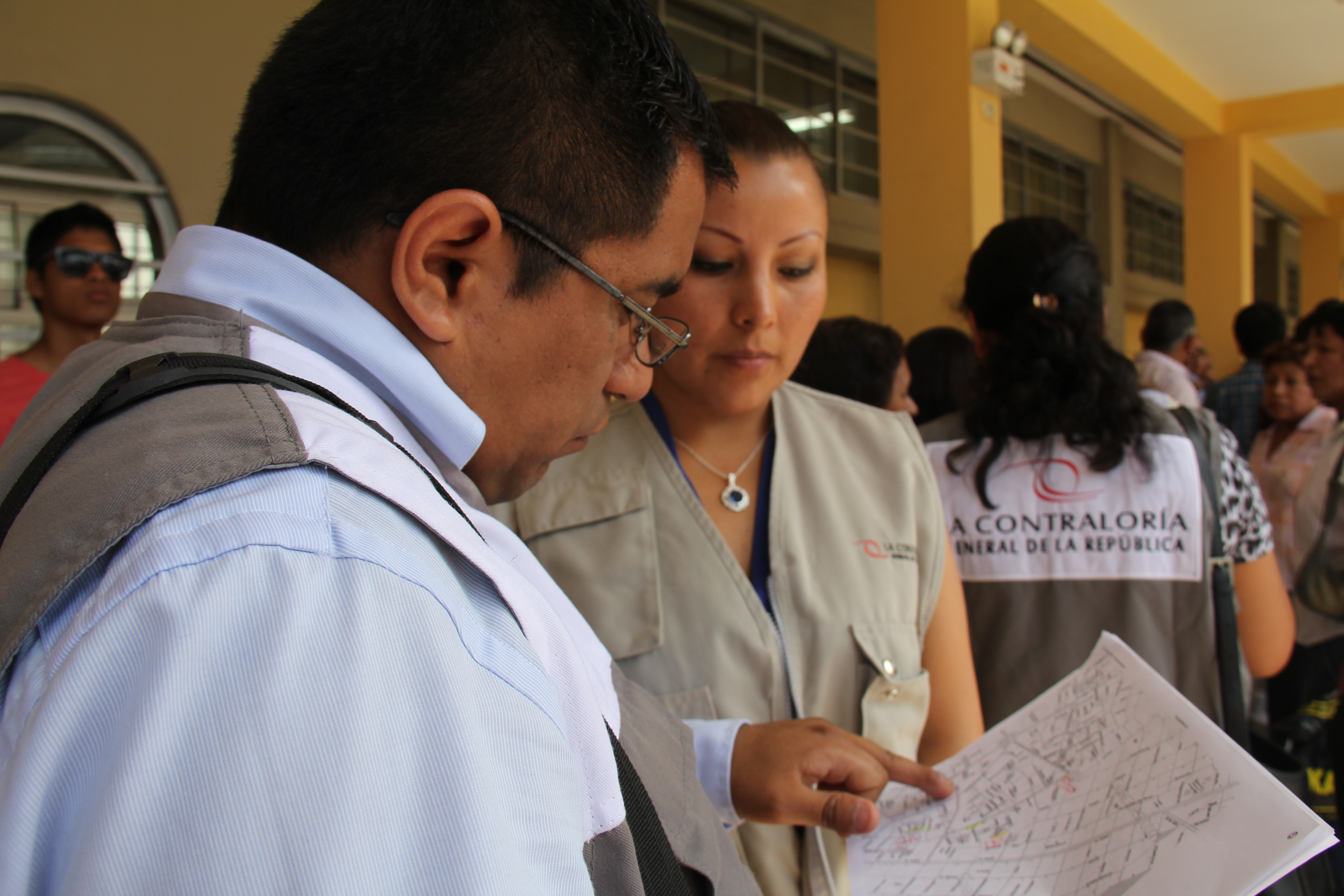 Acciones de control CGR